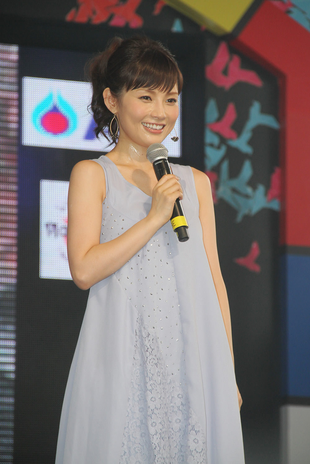 安倍なつみ タイ・バンコクでのライブの画像